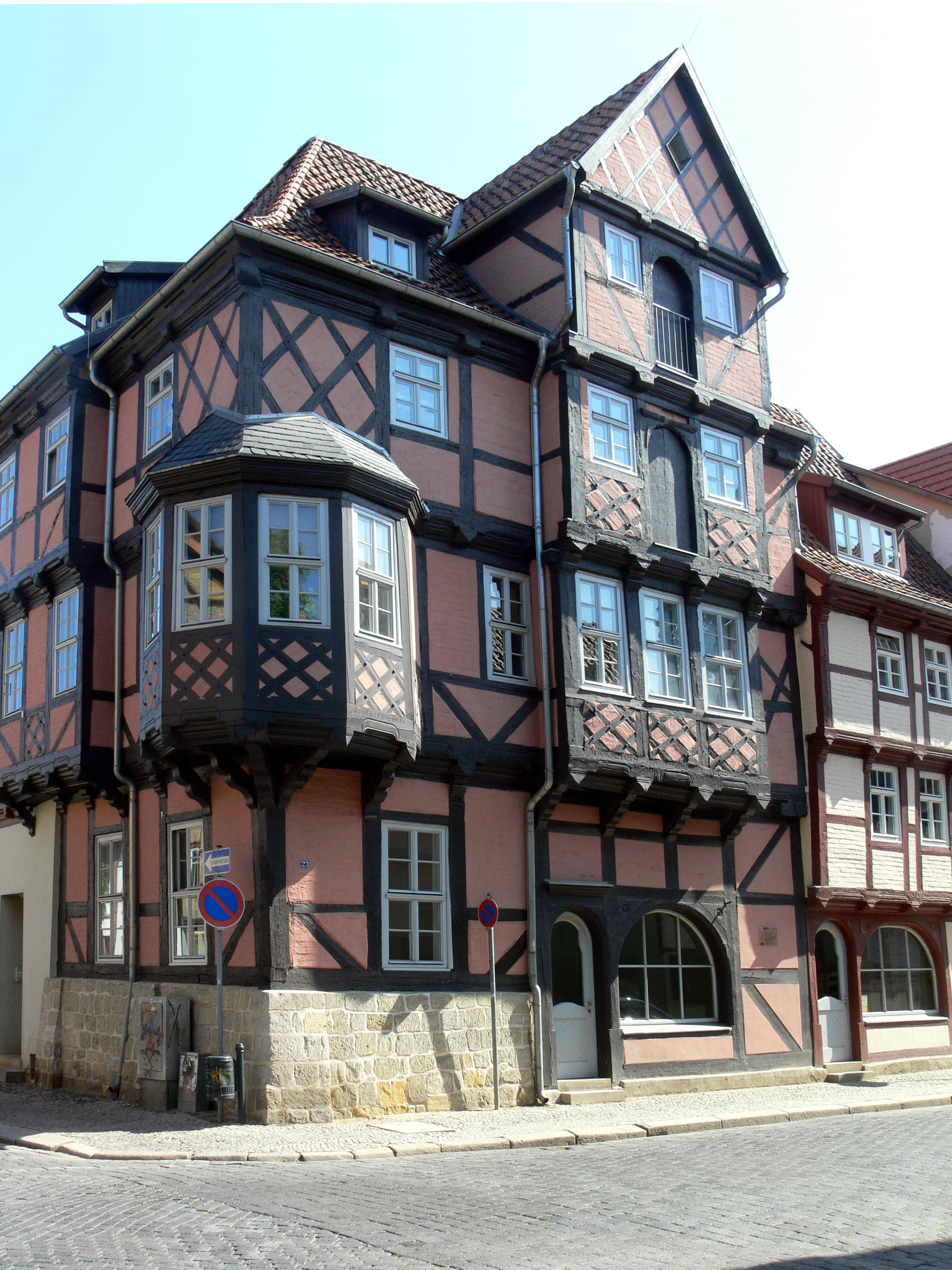 Haus Steinweg 23 = Börse